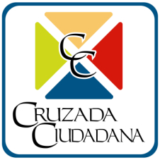 Logotipo Oficial del Partido Cruzada Ciudadana